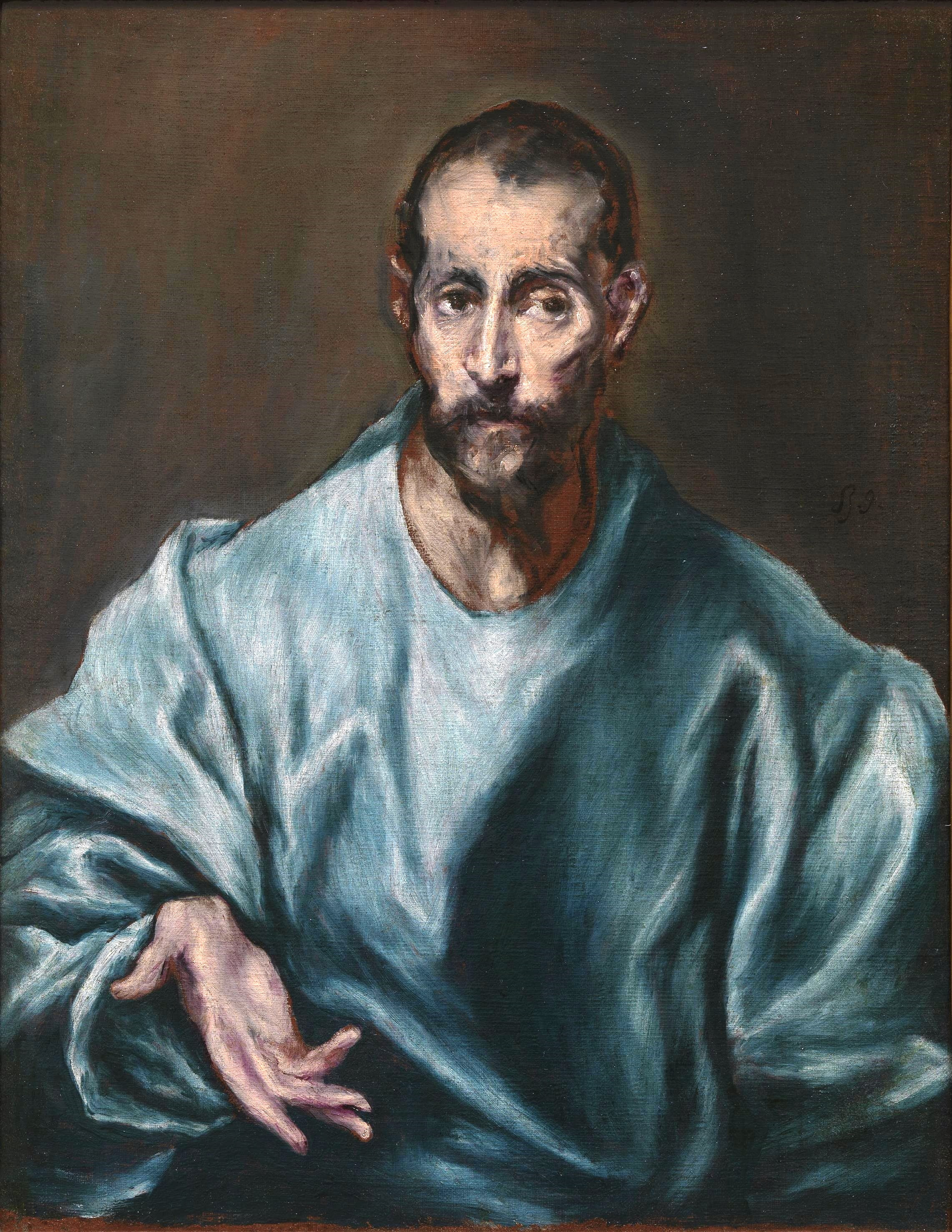 La obra representa al apóstol Santiago, aunque se desconoce si a Santiago el Mayor o a Santiago el Menor.